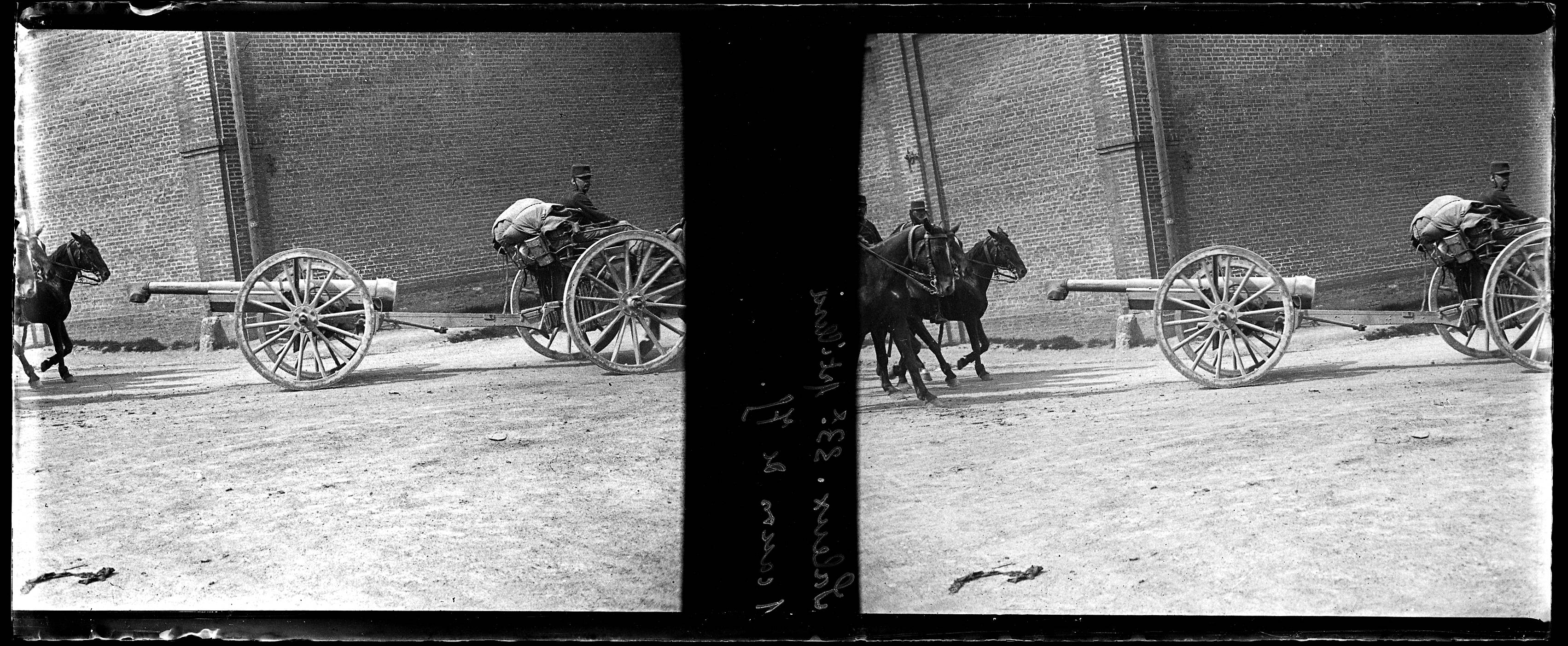 Vue d'ensemble d'un canon de 75 du 33e régiment d'artillerie tiré par une carriole à Saleux (Somme). 1915. Guerre 1914-1918. Voir aussi : File:Saleux. 120 long - Fonds Berthelé - 49Fi797.jpg